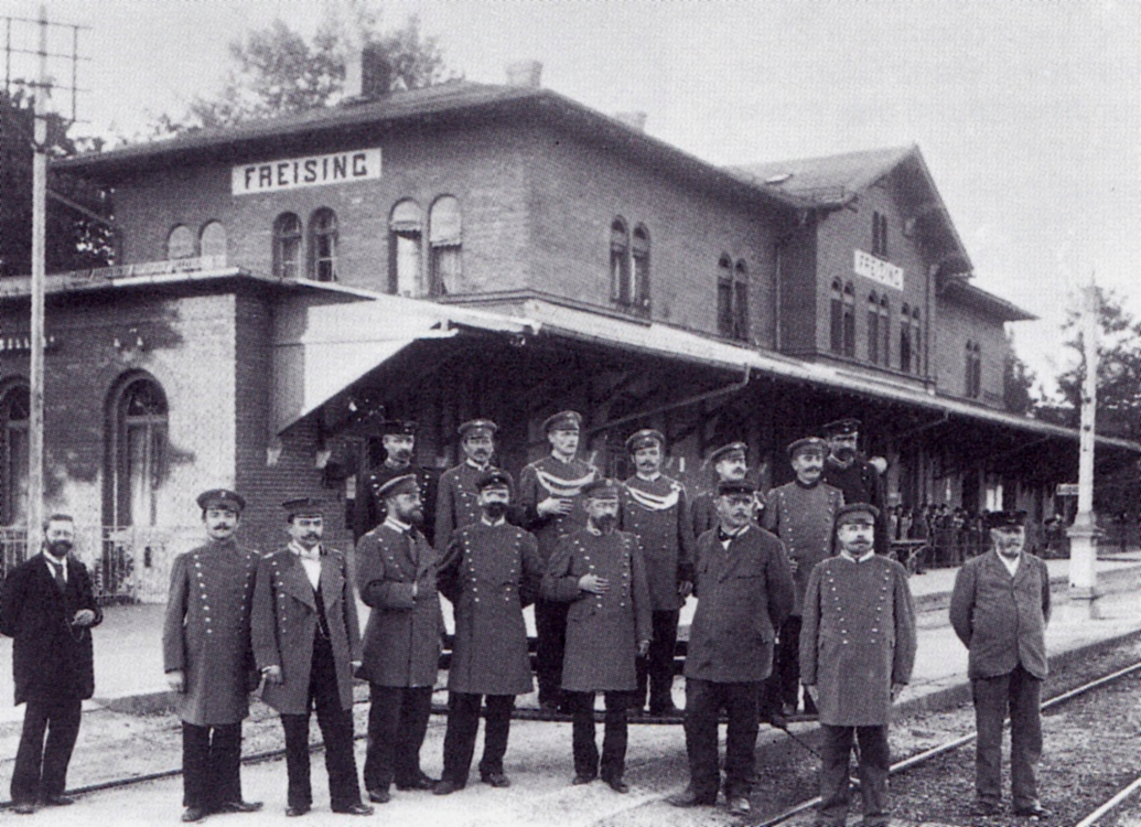 Empfangsgebäude des Bahnhofs Freising von der Gleisseite